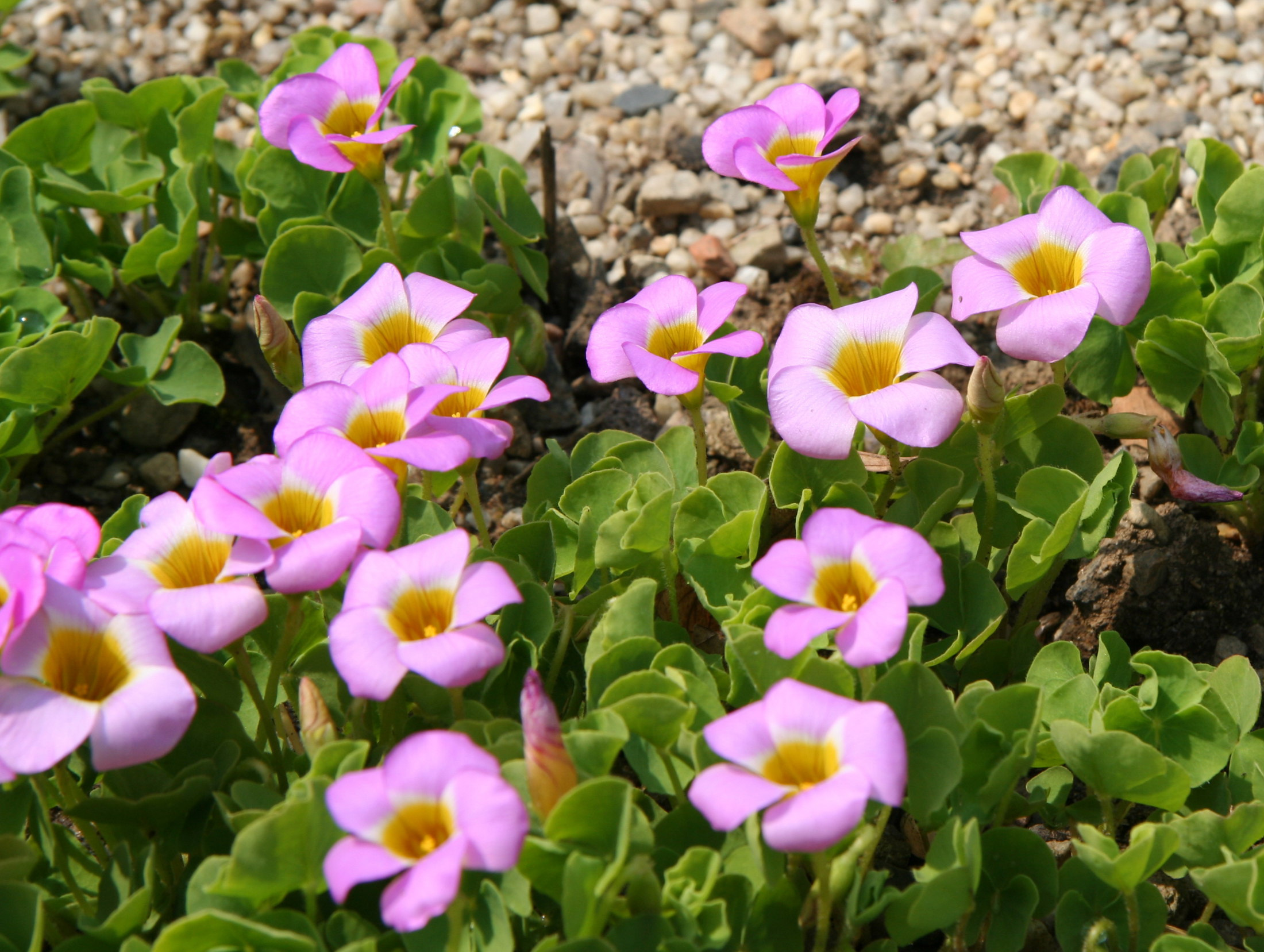 Oxalis depressa im Botanischen Garten Dresden